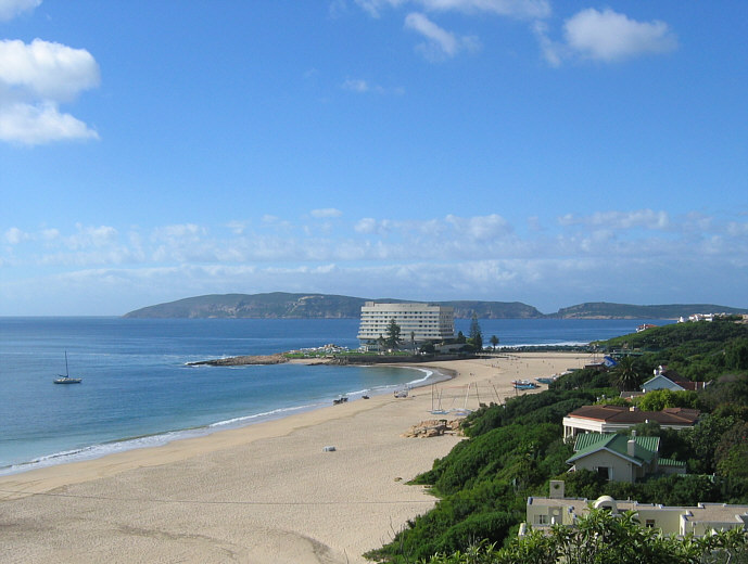 Plettenberg Bay